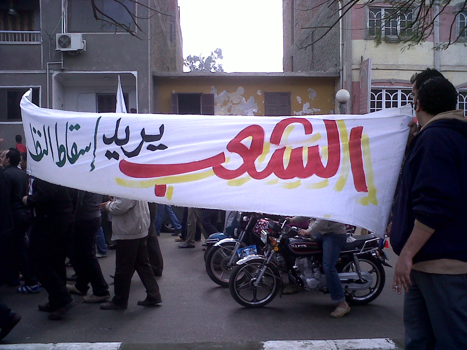 25-01-2011, Imbaba, Cairo.